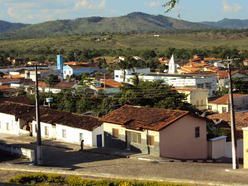 Vista panorâmica de parte do Centro de Itambé (Bahia)